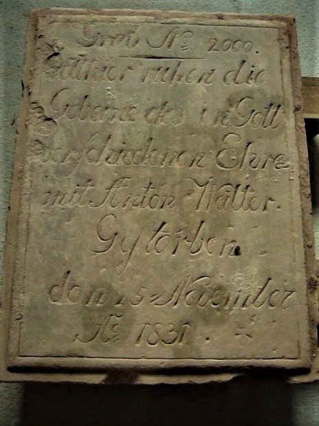 Płyta nagrobna